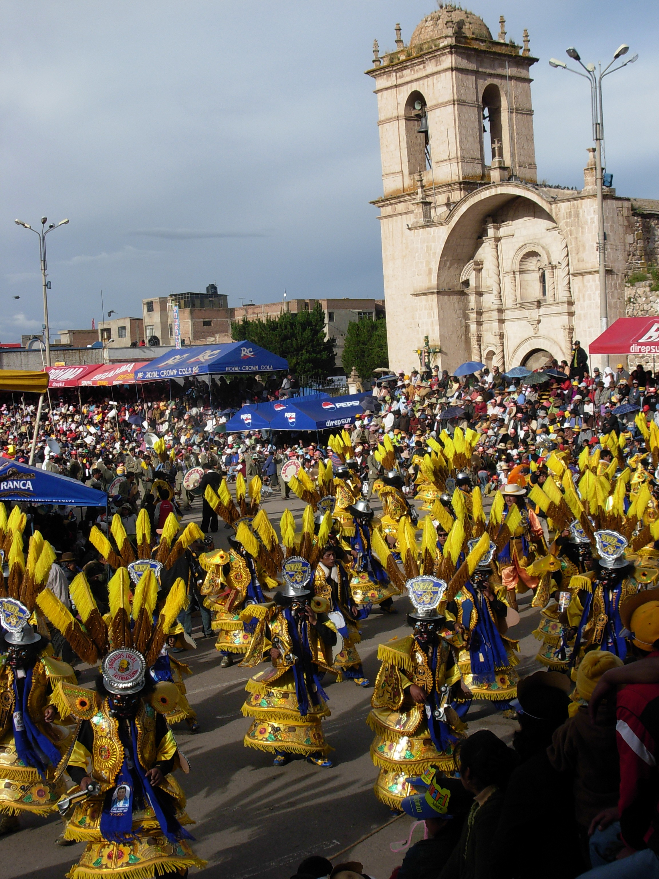 Carnaval de Juliaca el mas grandioso y fastuoso del Peru